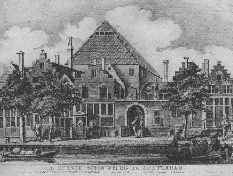 De Eerste Schouwburg te Amsterdam. Costers' Nederduitsche Academie. Het gebouw van de Nederduytsche Academie.